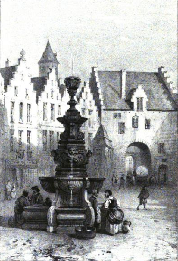 Prent van de Steenpoort in Brussel en de nabijgelegen fontein (1682-1825)